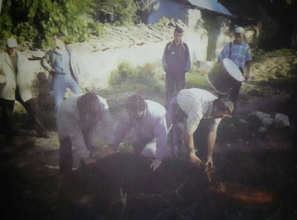 Therja e mishit të dasmës